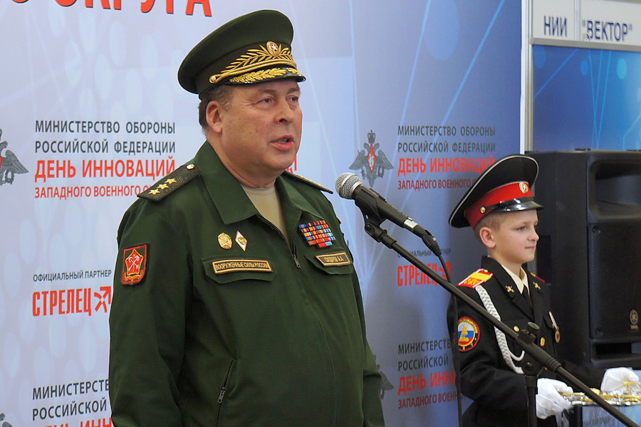 Командующий войсками Западного военного округа генерал-полковник Анатолий Сидоров на Дне инноваций Западного военного округа (аэр. «Левашово», Ленинградская обл.)